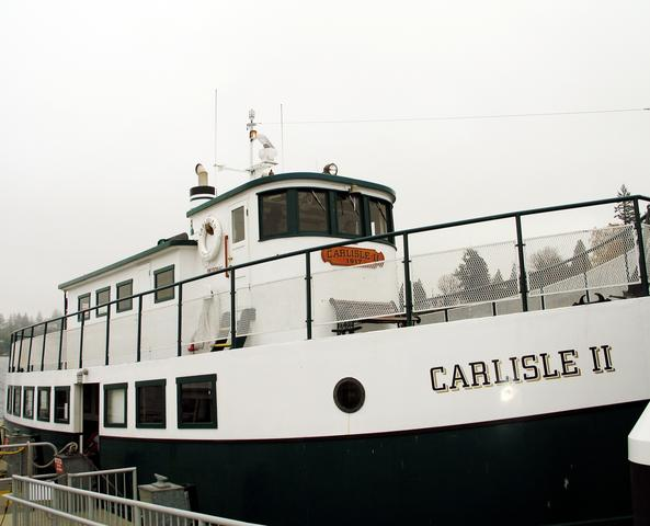 Passenger Ferry on Puget Sound, Wa.